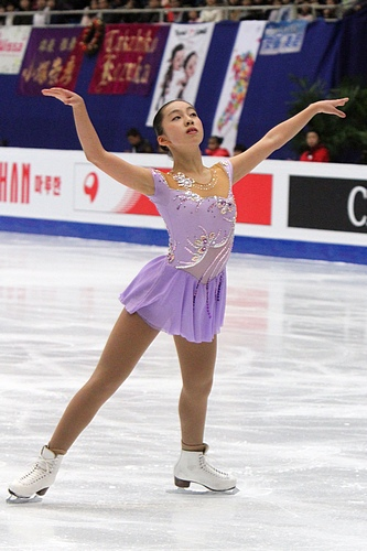 Risa Shoji at the 2010-2011 Junior Grand Prix of Figure